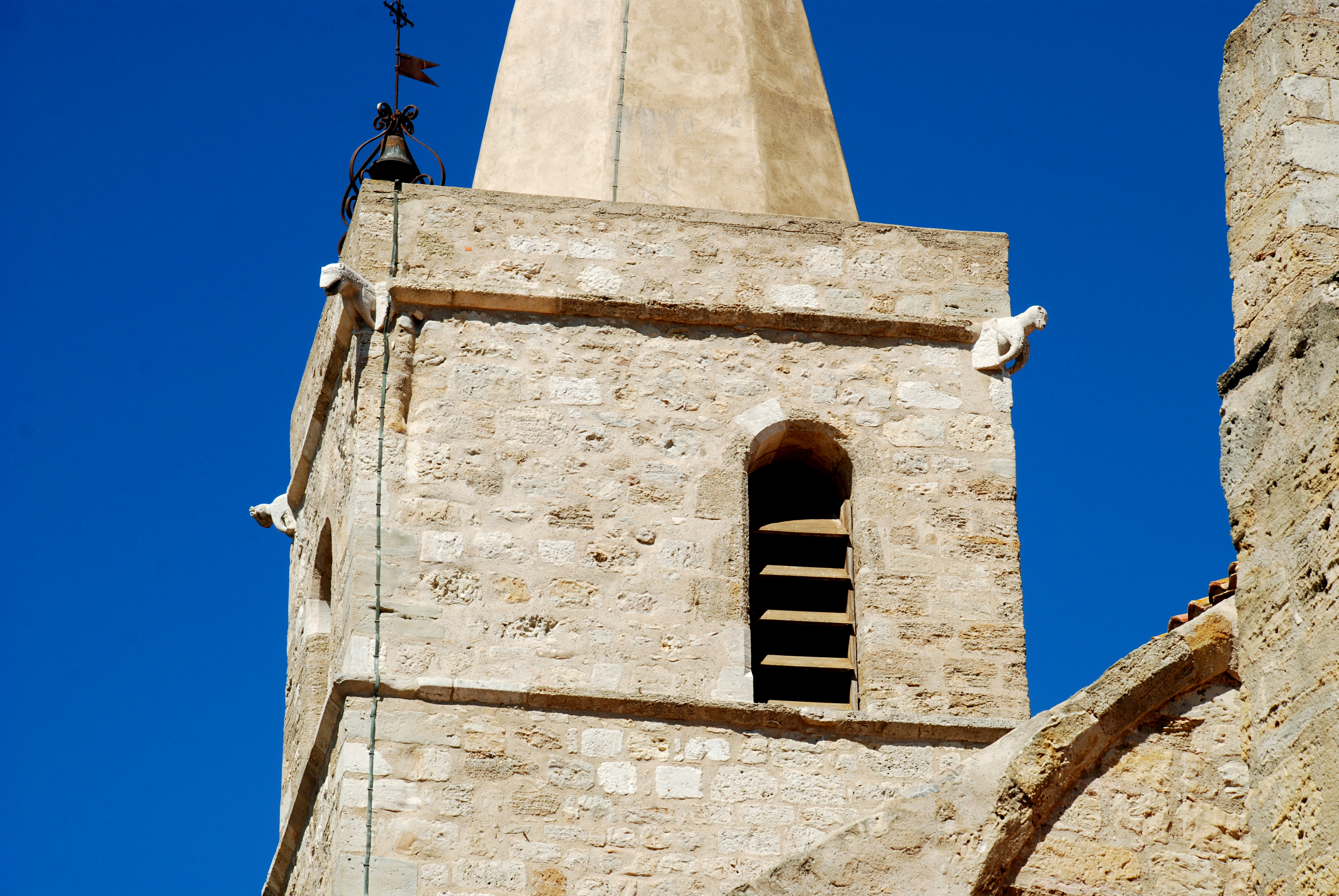 France - Languedoc - Aude - Église Saint-Jean l’Évangéliste d'Ouveillan